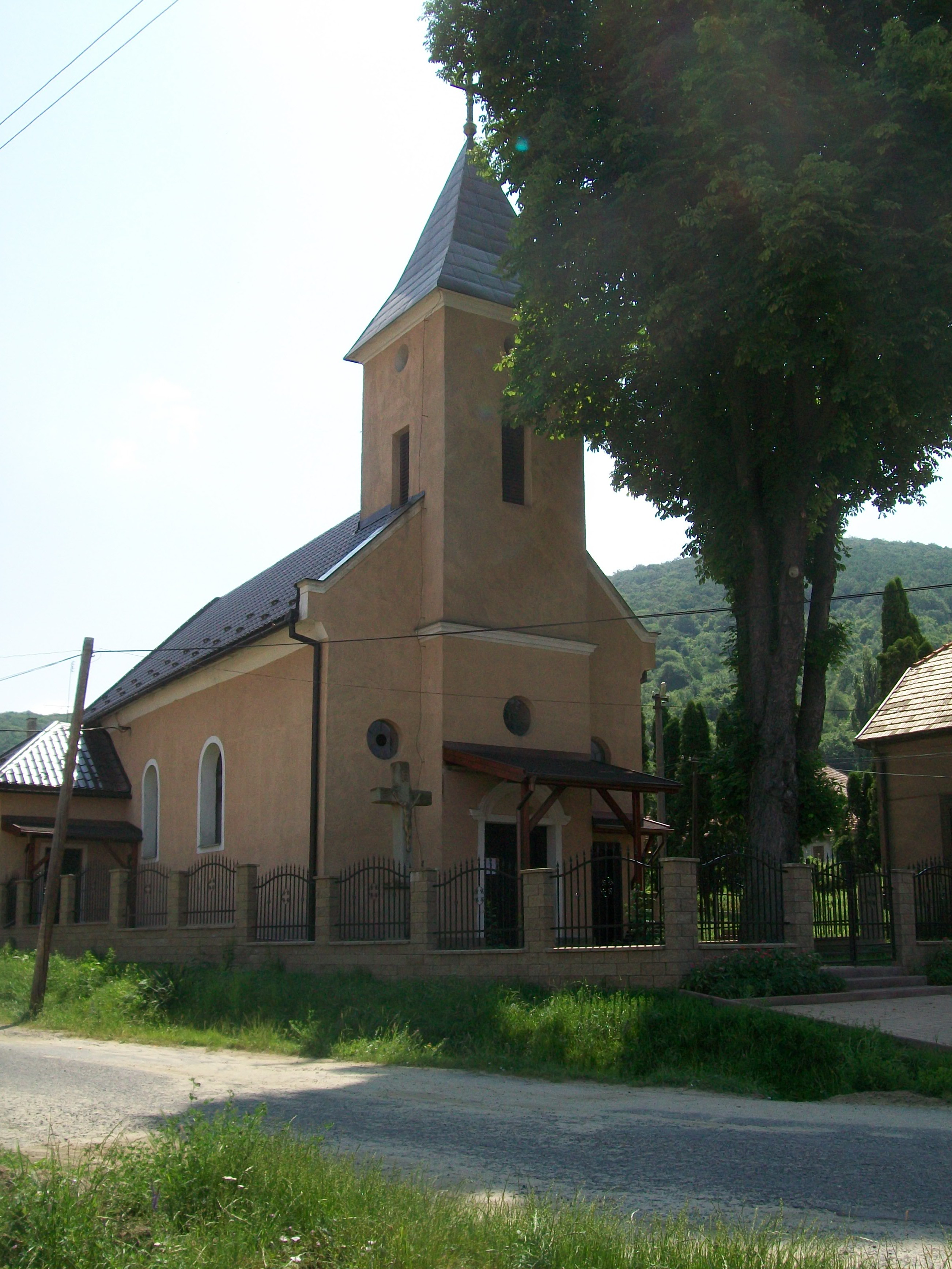 Rímskokatolícky Kostol Nanebovstúpenia Pána v Beline (okr. Lučenec)